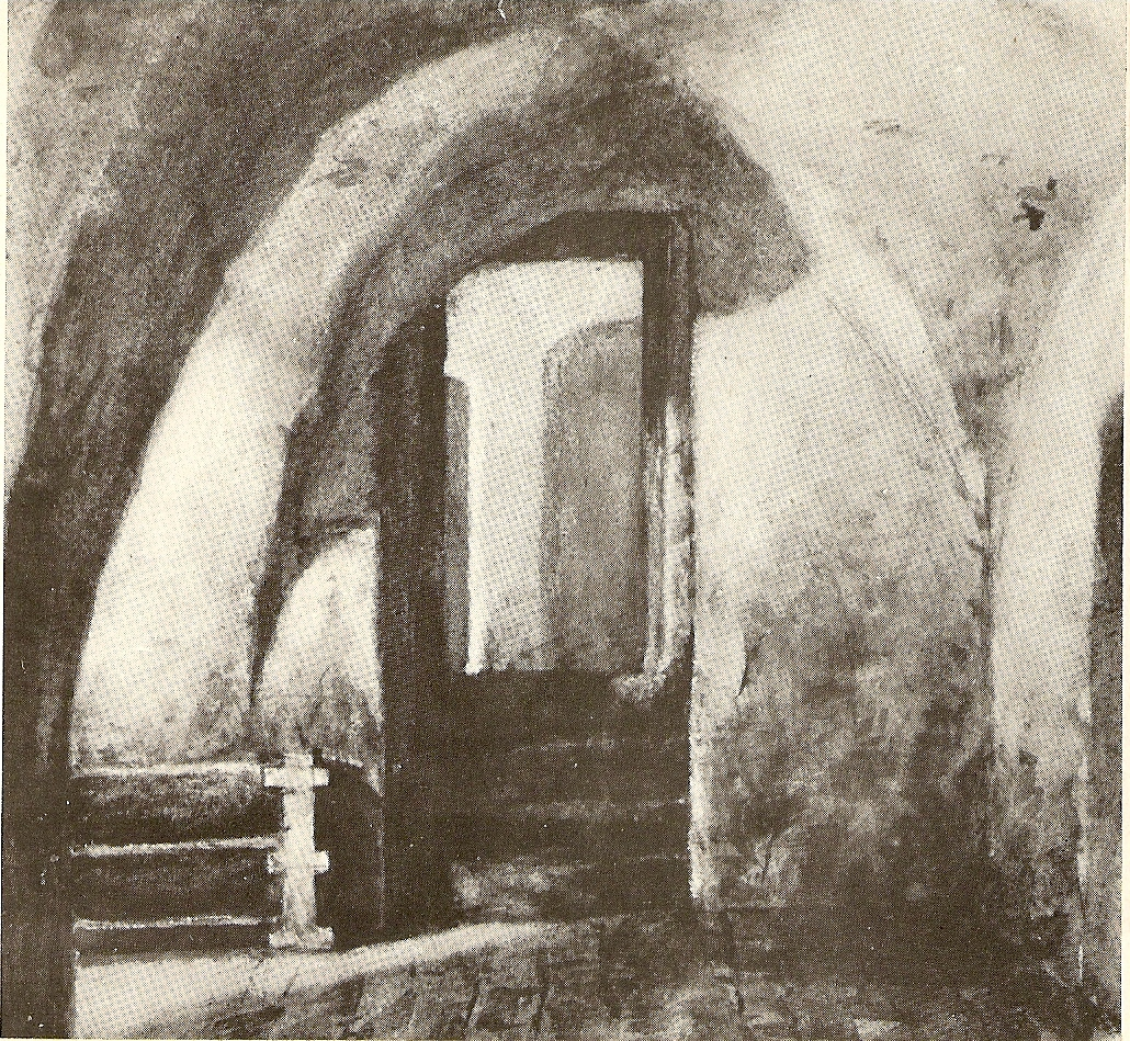 Aquarell des Kellers der Löwen-Apotheke in Lübeck, gemalt von der Tochter des damaligen Apothekers Theodor Schorer (1836-1918).